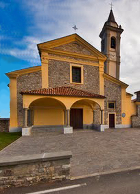 opera propria, foto, Chiesa parrocchiale di Santa Maria del Carmine a Santa Maria (Bobbio - PC), licenza libera